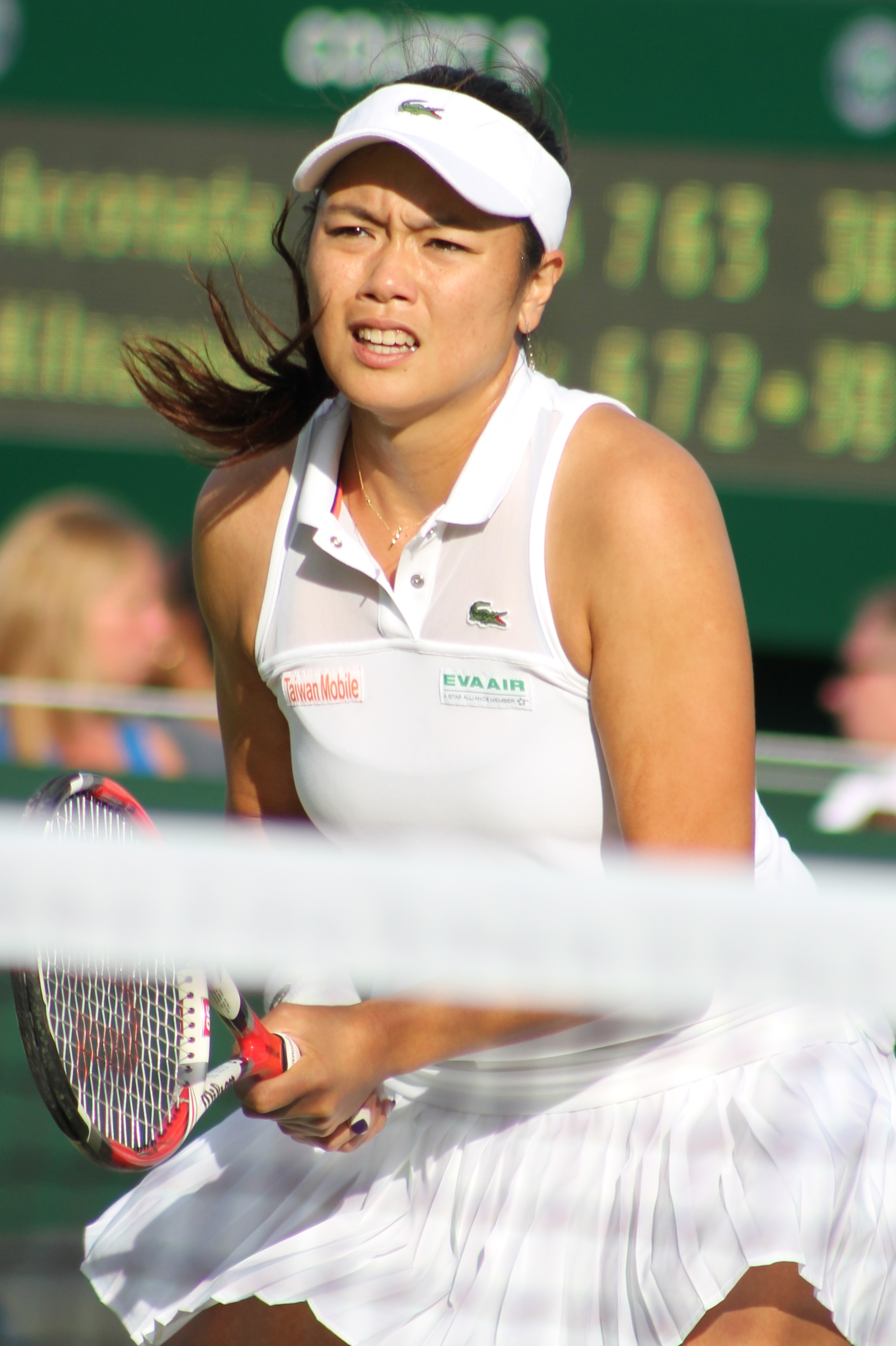 Chan Y.J. WM15 (16)